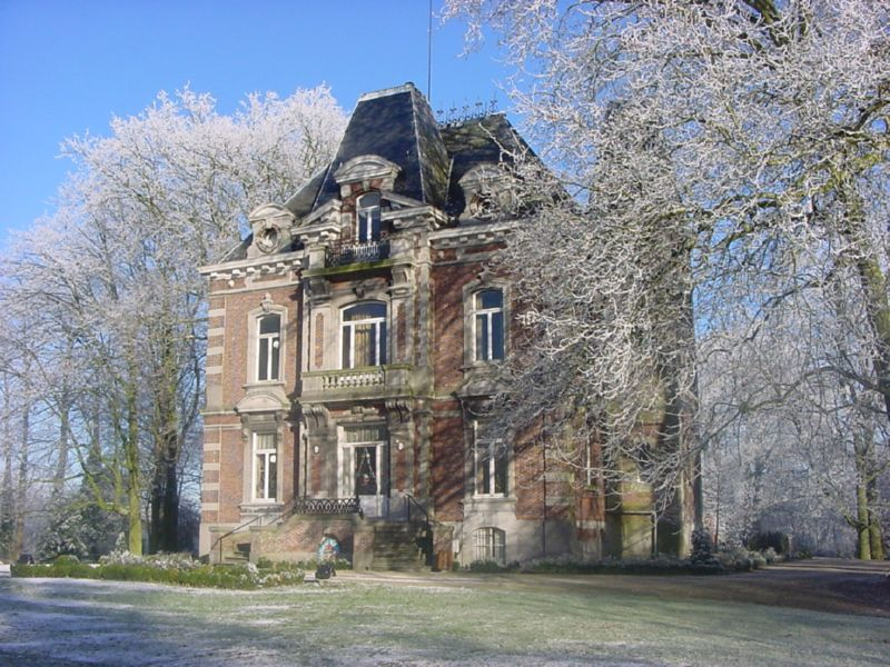 Beukenhof, Vichte (een dorp in de Belgische provincie West-Vlaanderen en een deelgemeente van Anzegem, West-Vlaanderen)